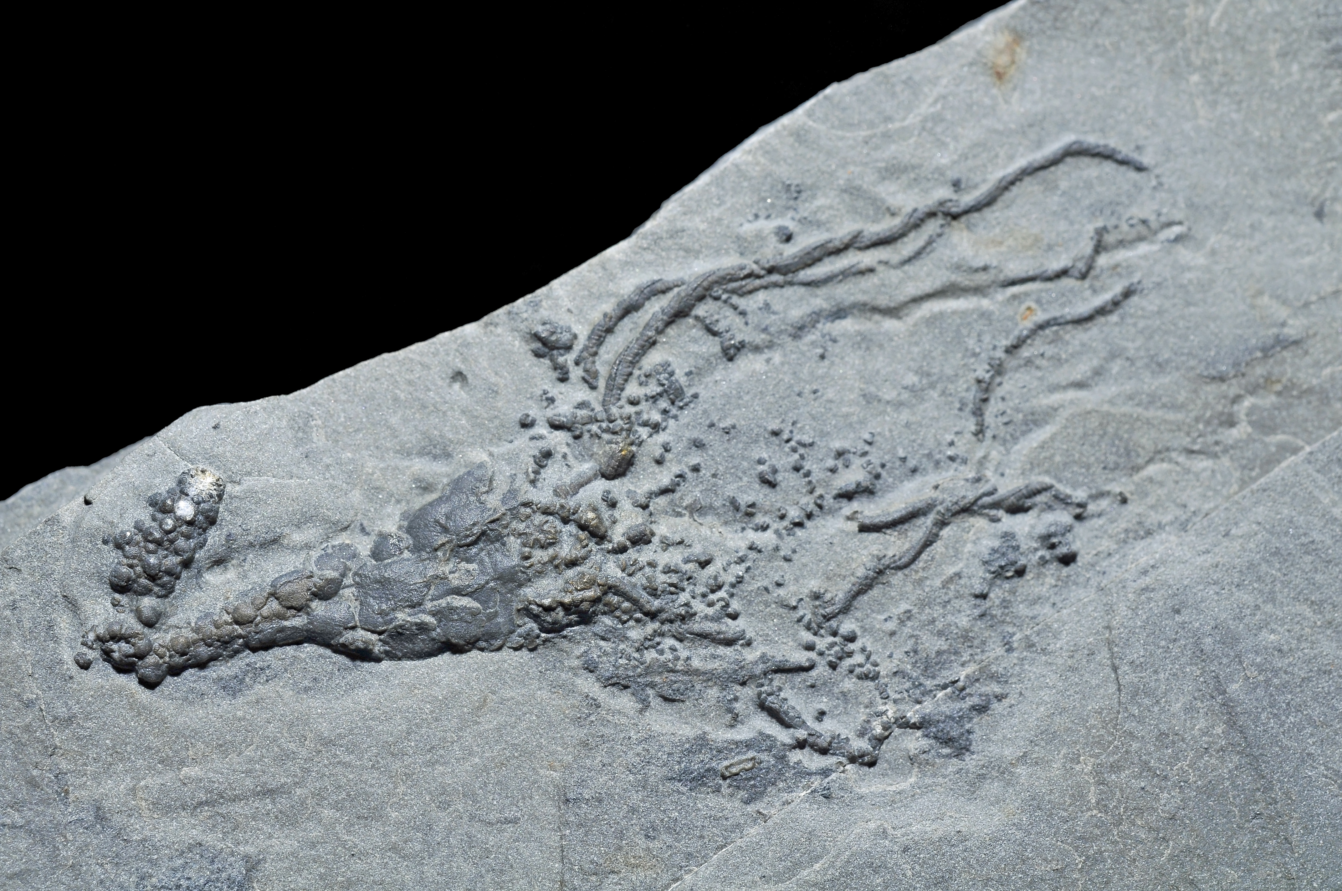 Gogia spiralis Robison 1965 : Wheeler Shale Formation, Housse Range, Utah, USA - ca. 507 MA